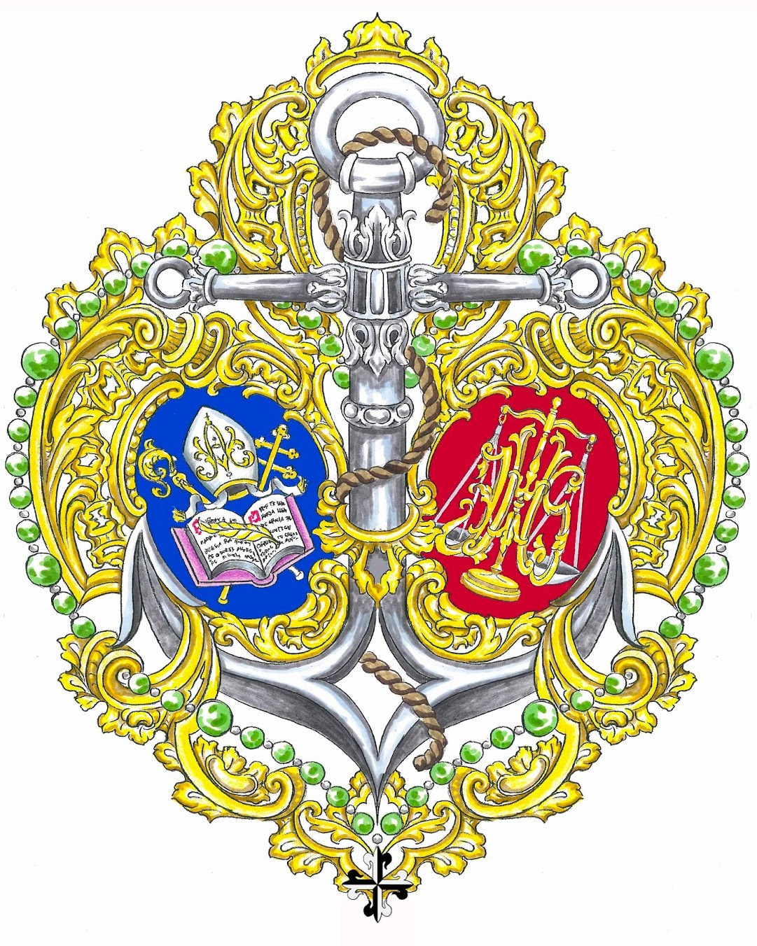 Escudo Hermandad Macarena (Almería)